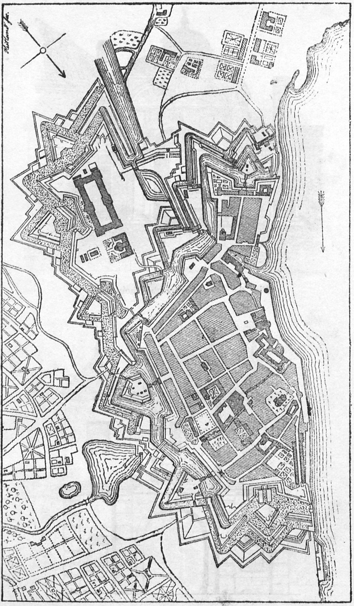 Plan von Düsseldorf im Jahr 1764